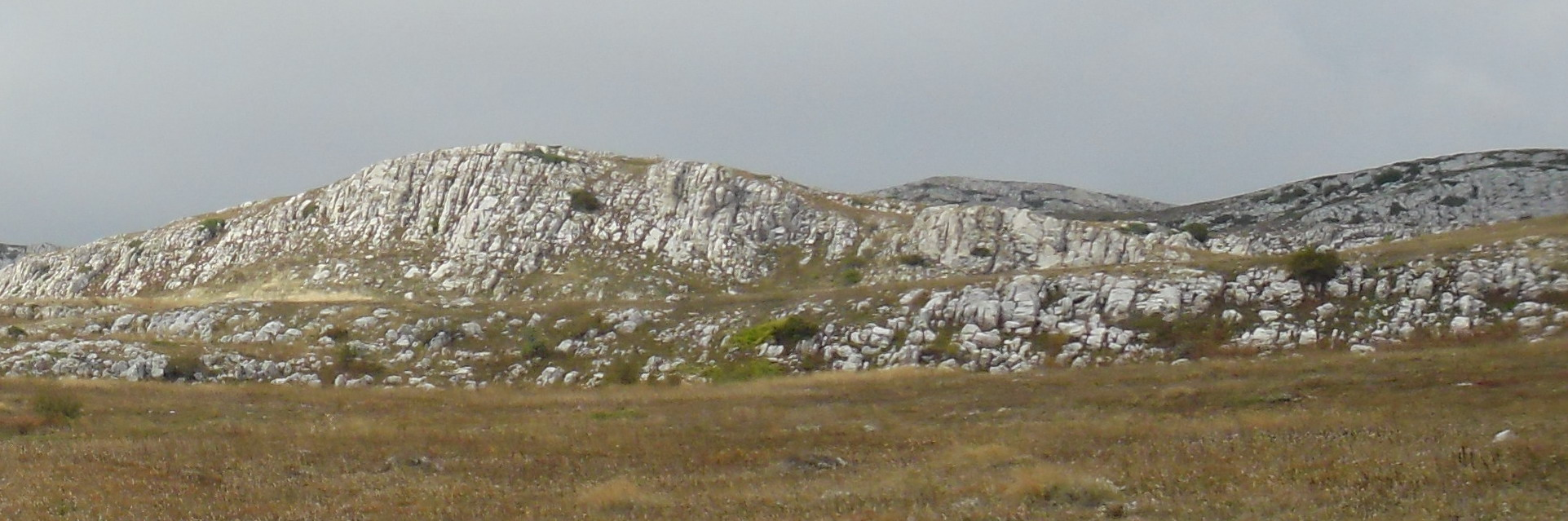 Чатир-Даг